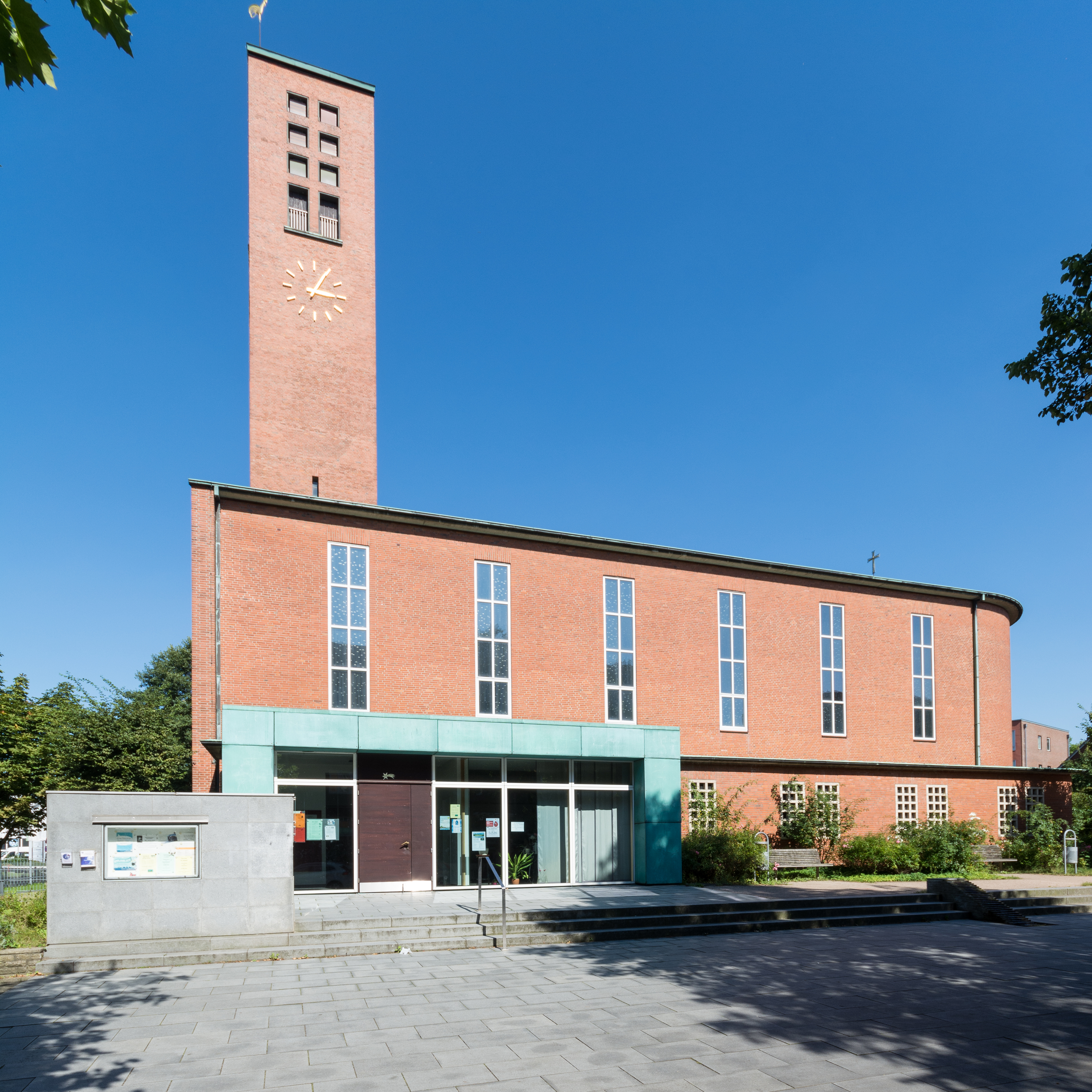 Epiphanienkirche in Hamburg-Winterhude. This is a photograph of an architectural monument.